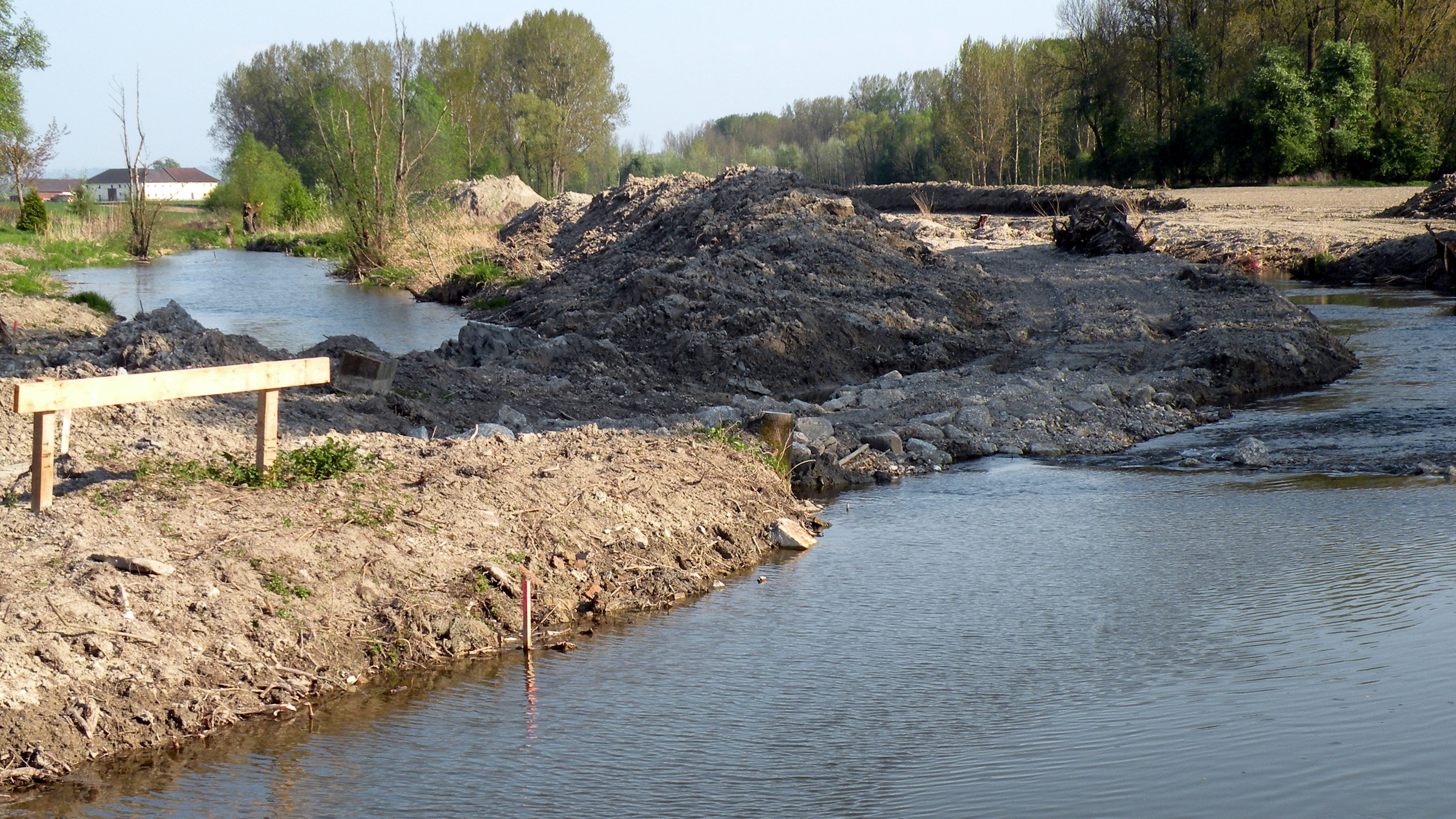 Machlanddamm Verlegung des Aist-Mühlbaches bei Staffling